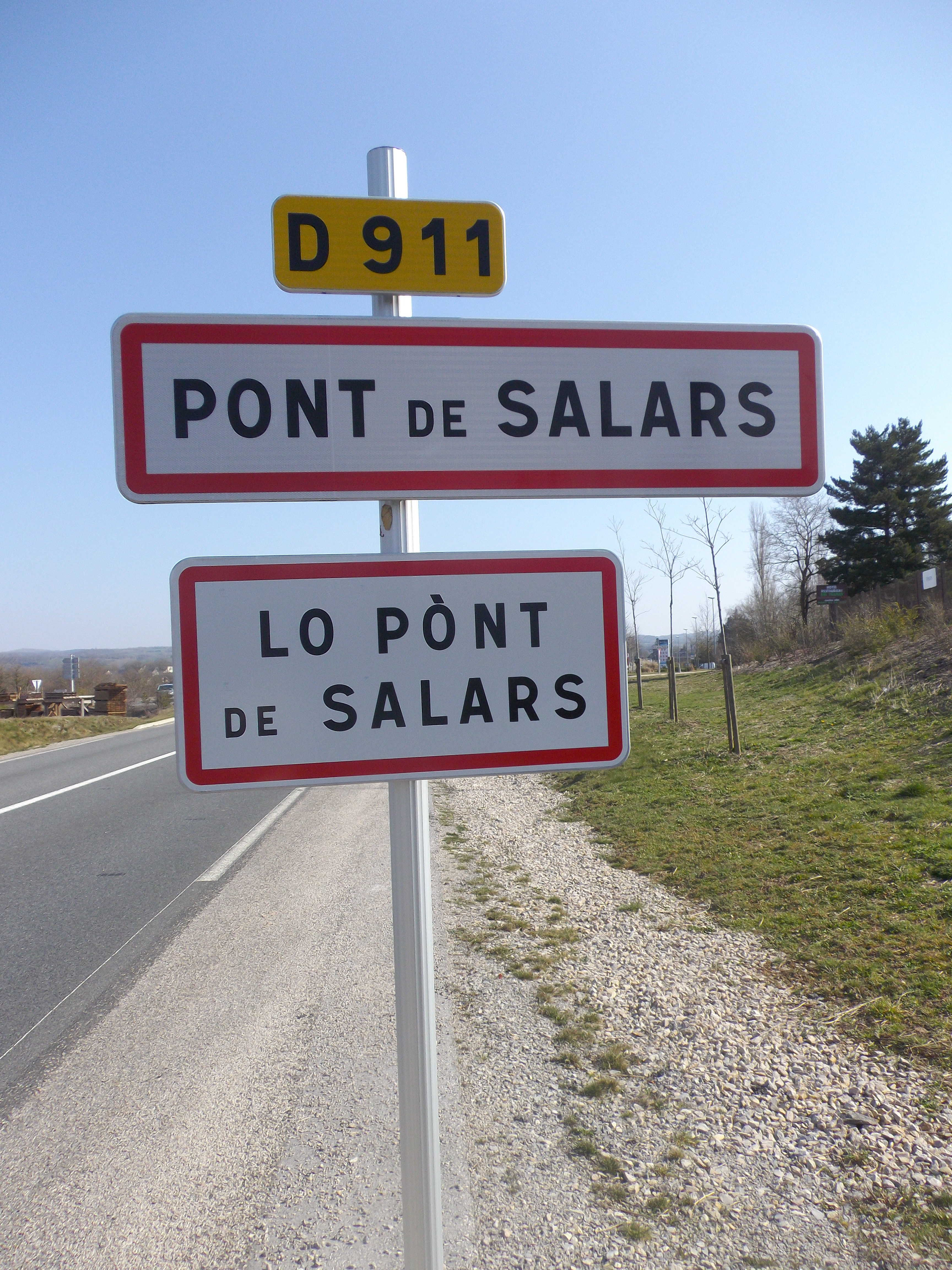 Signalisation bilingue occitan-français à l’entrée de Pont de Salars / Lo Pònt de Salars (Aveyron, France).